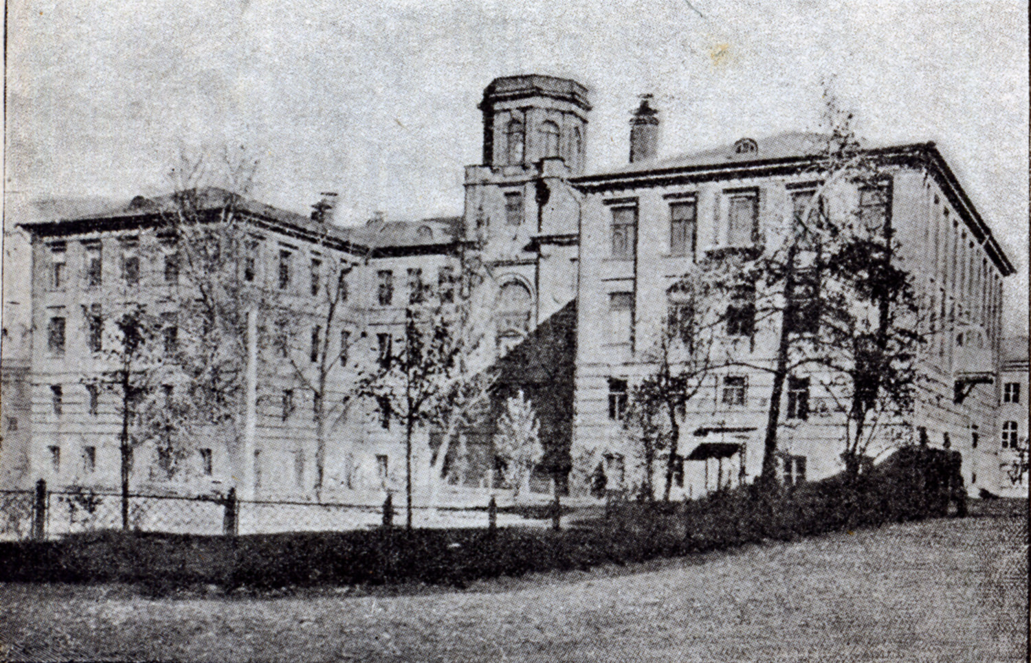 Здание Физического института Императорского Московского университета на Большой Никитской улице (1906). Проект 1903 год. Здание умышленно стилизовано под Кунсткамеру в Петербурге, в память о 200-летии столицы государства.